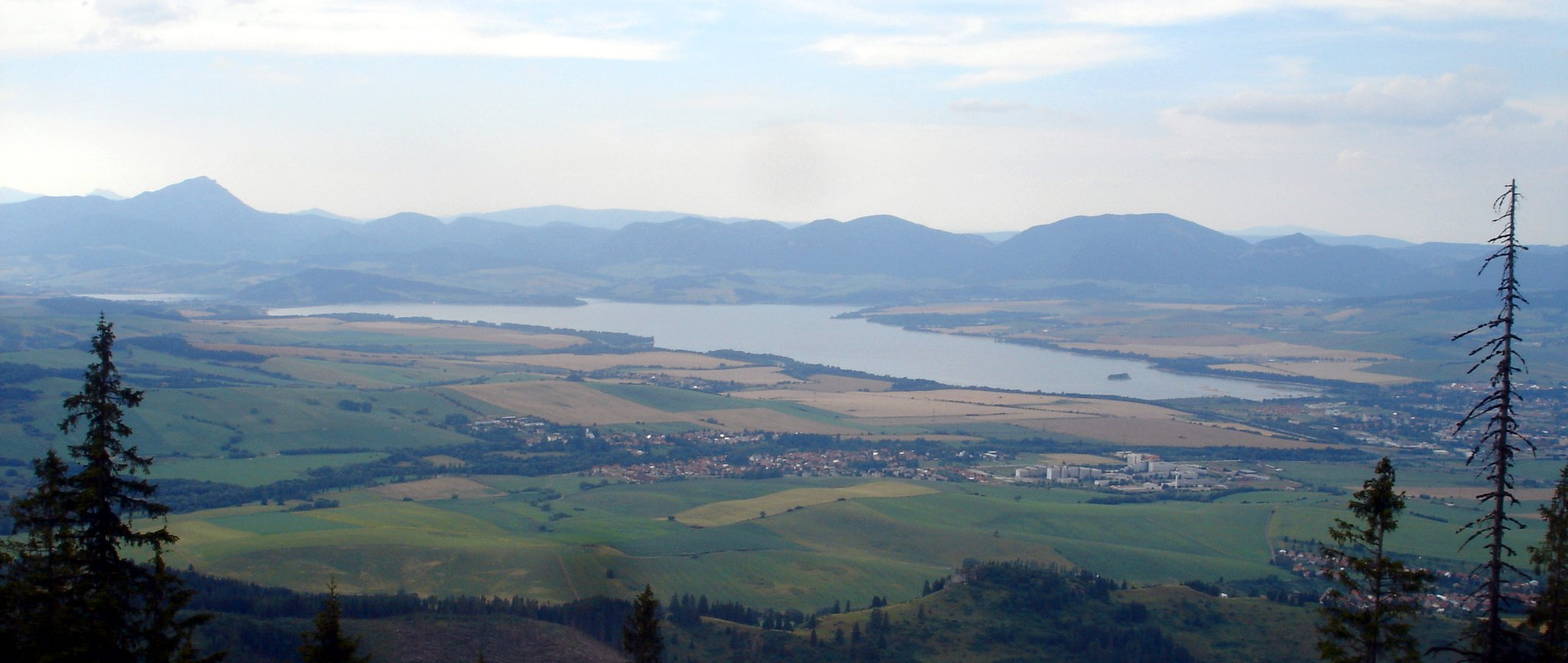 Liptovská Mara, Slovensko. De Nízke Tatry (de sudo)